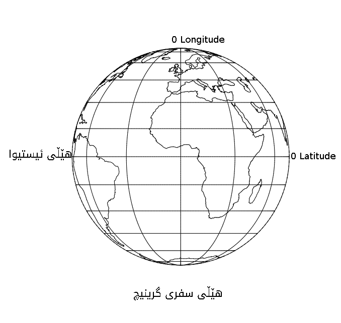 کوردی: گۆی زەوی تەنها هێڵی سفری پانی و درێژی نیشاندراوە